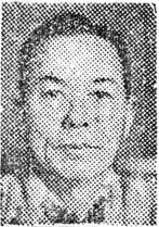 김성수